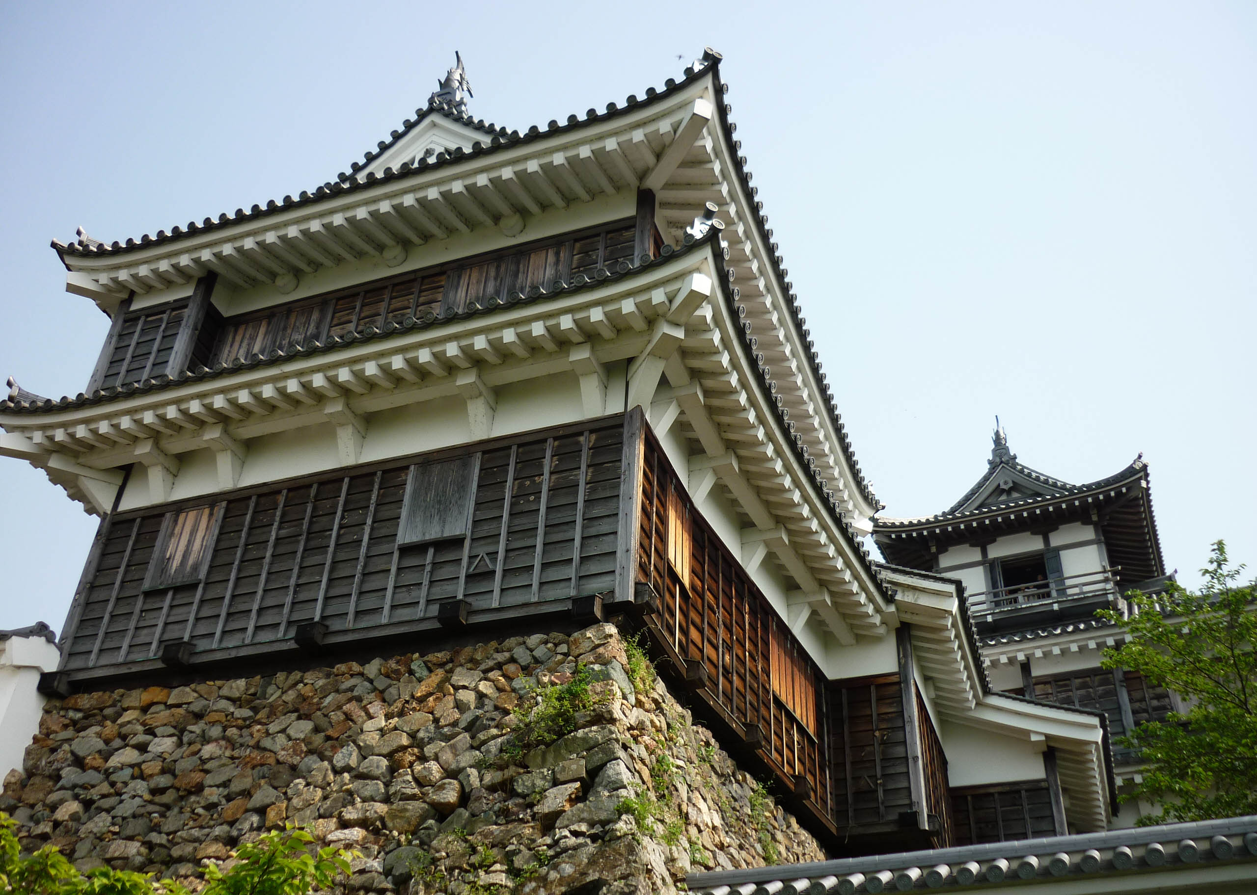 小天守